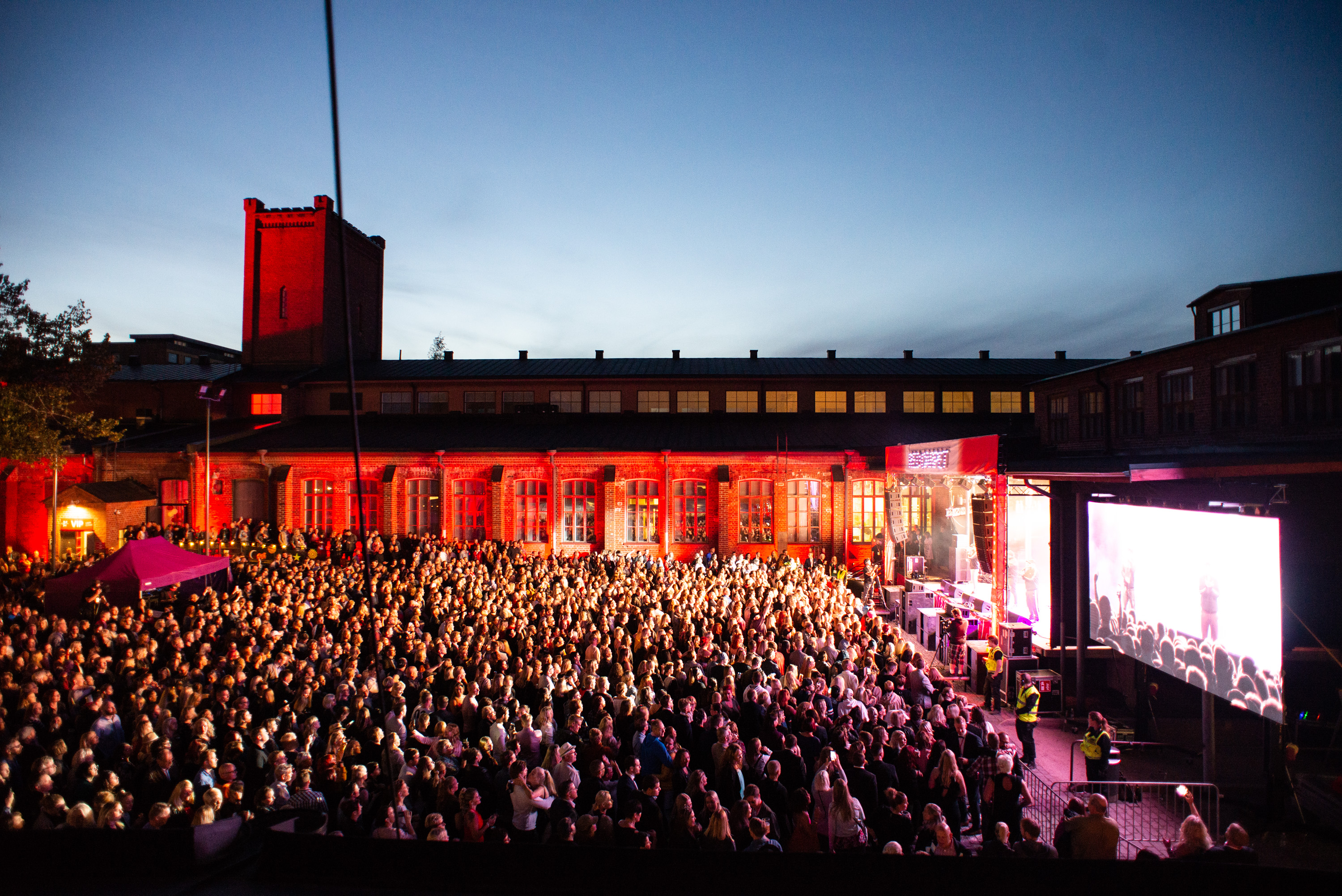 Red Carpetin konserttialue Villatehtaalla vuonna 2019.